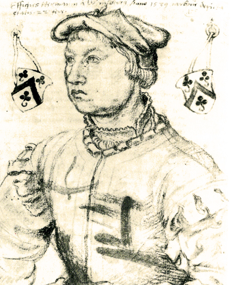 Hermann von Weinsberg, 1539. Der Ratsherr im Alter von 22 Jahren. Zeichnung von Meister Johann aus der Werkstatt Bartholomäus Bruyn dem Älteren (Zeughaus Köln)